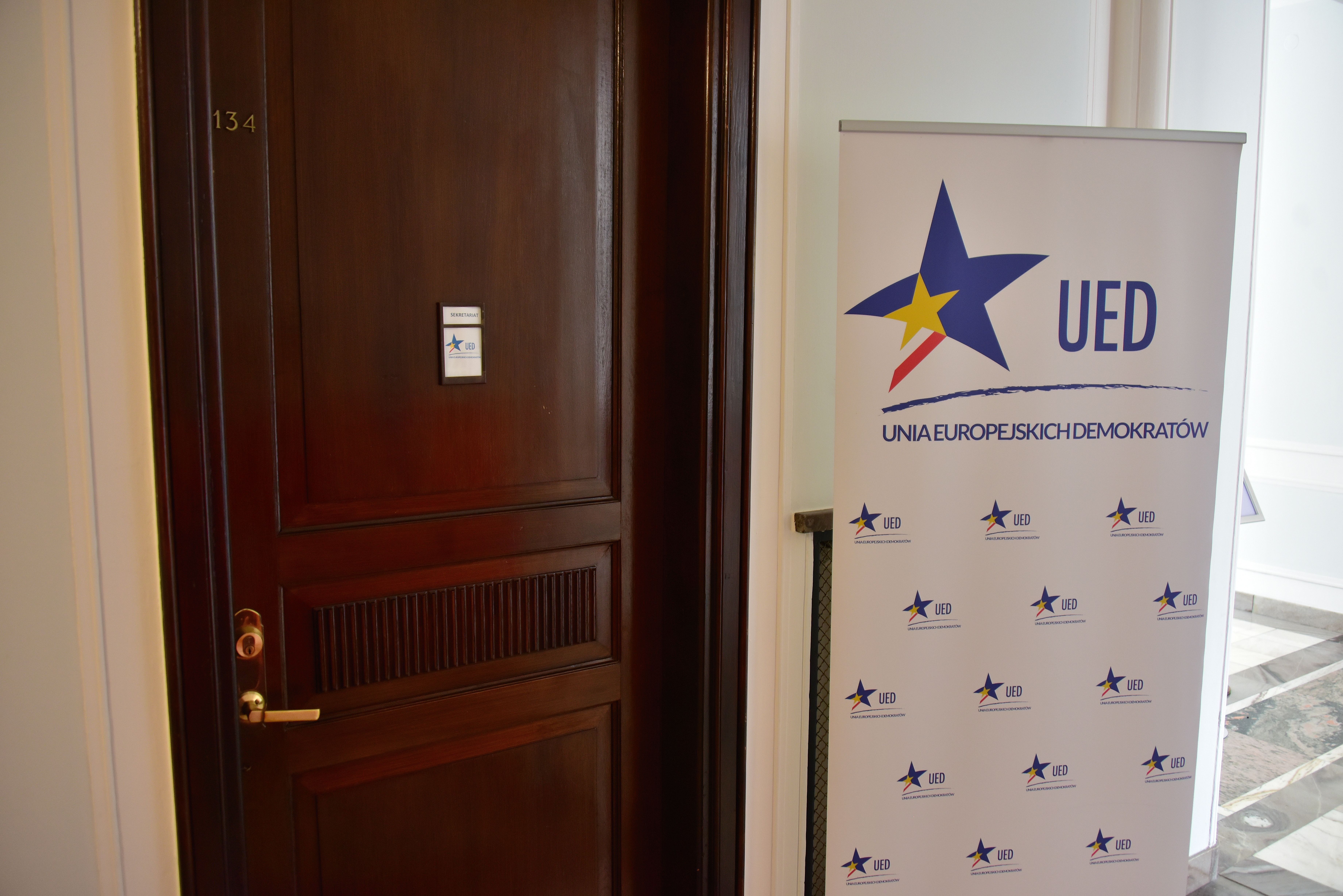 Wejście do sekretariatu Unii Europejskich Demokratów w Sejmie